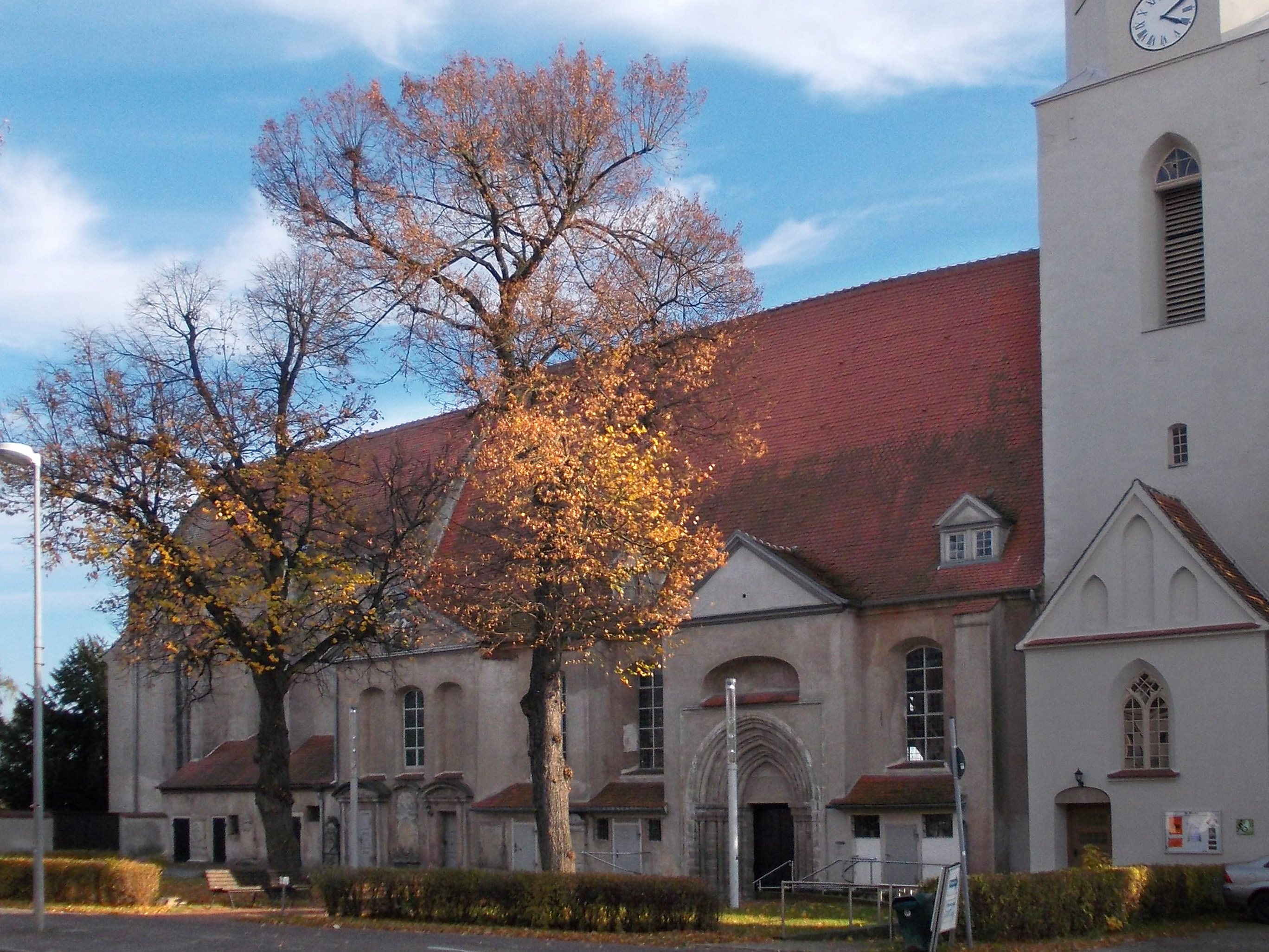 Coswig (Anhalt),St. Nicolai, Nordwand, Foto: Juni 2015